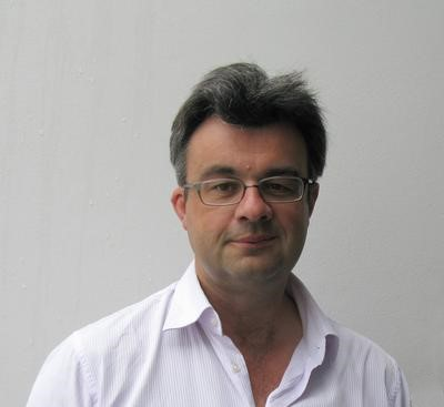 Foto di Emmanuel Candès